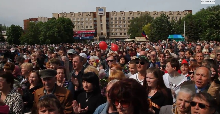 Горожане на митинге 9 мая в Славянске.